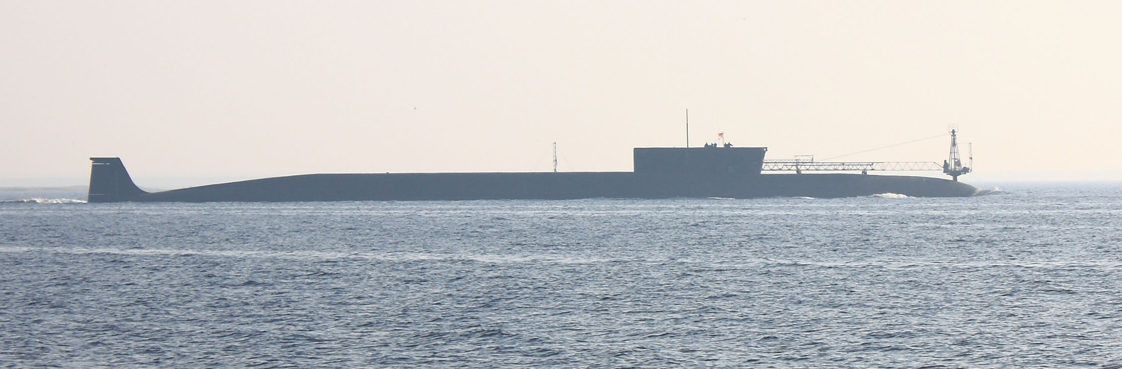 АПЛ Юрий Долгорукий проект «Борей» выходит из Никольского устья Белого моря.